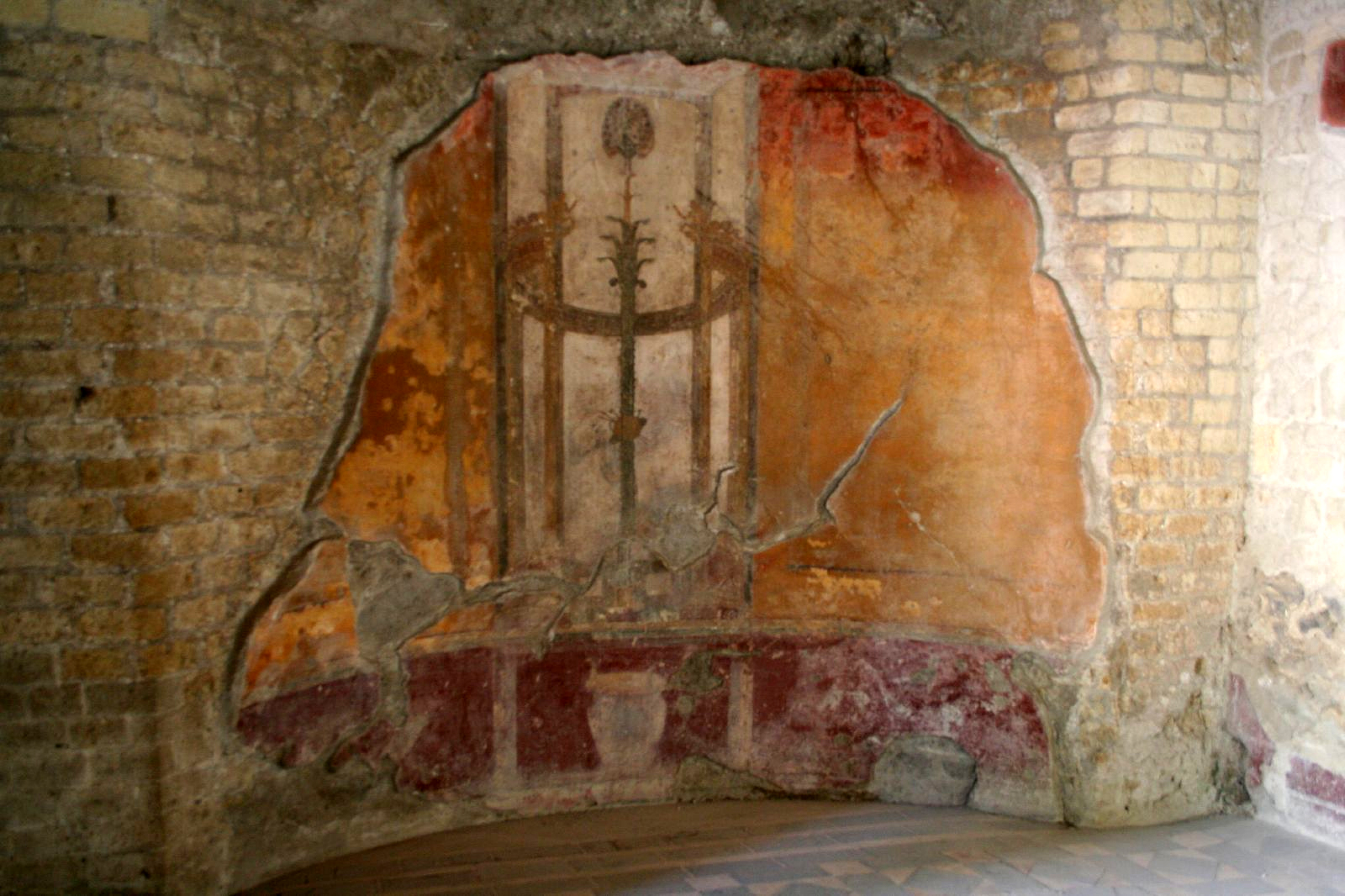 בית השלד.